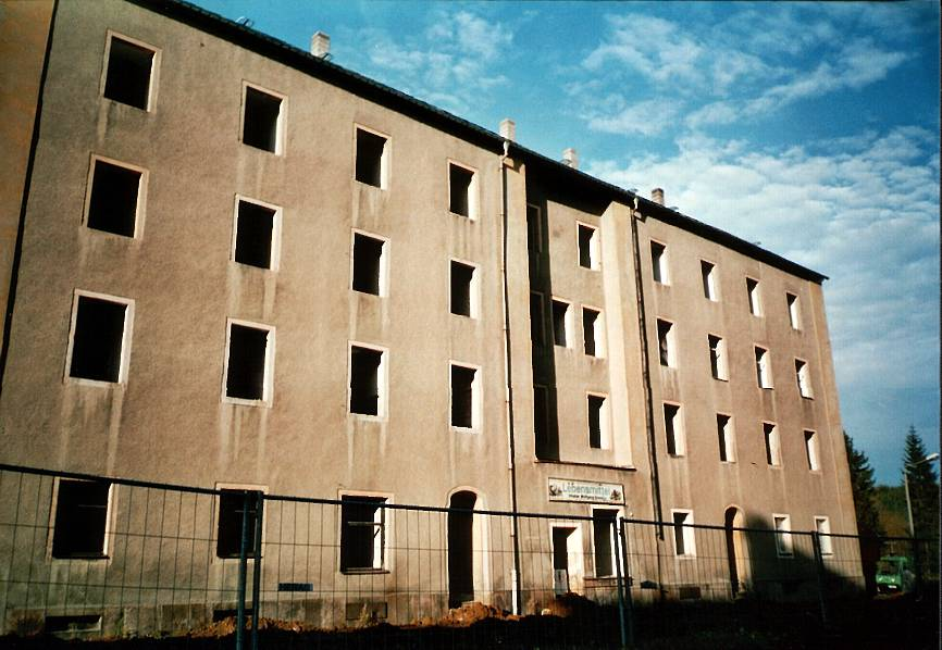 Das Bergmagazin Johanngeorgenstadt wenige Stunden vor dem Abriss, November 2005. Johanngeorgenstadt, Sachsen, Deutschland.